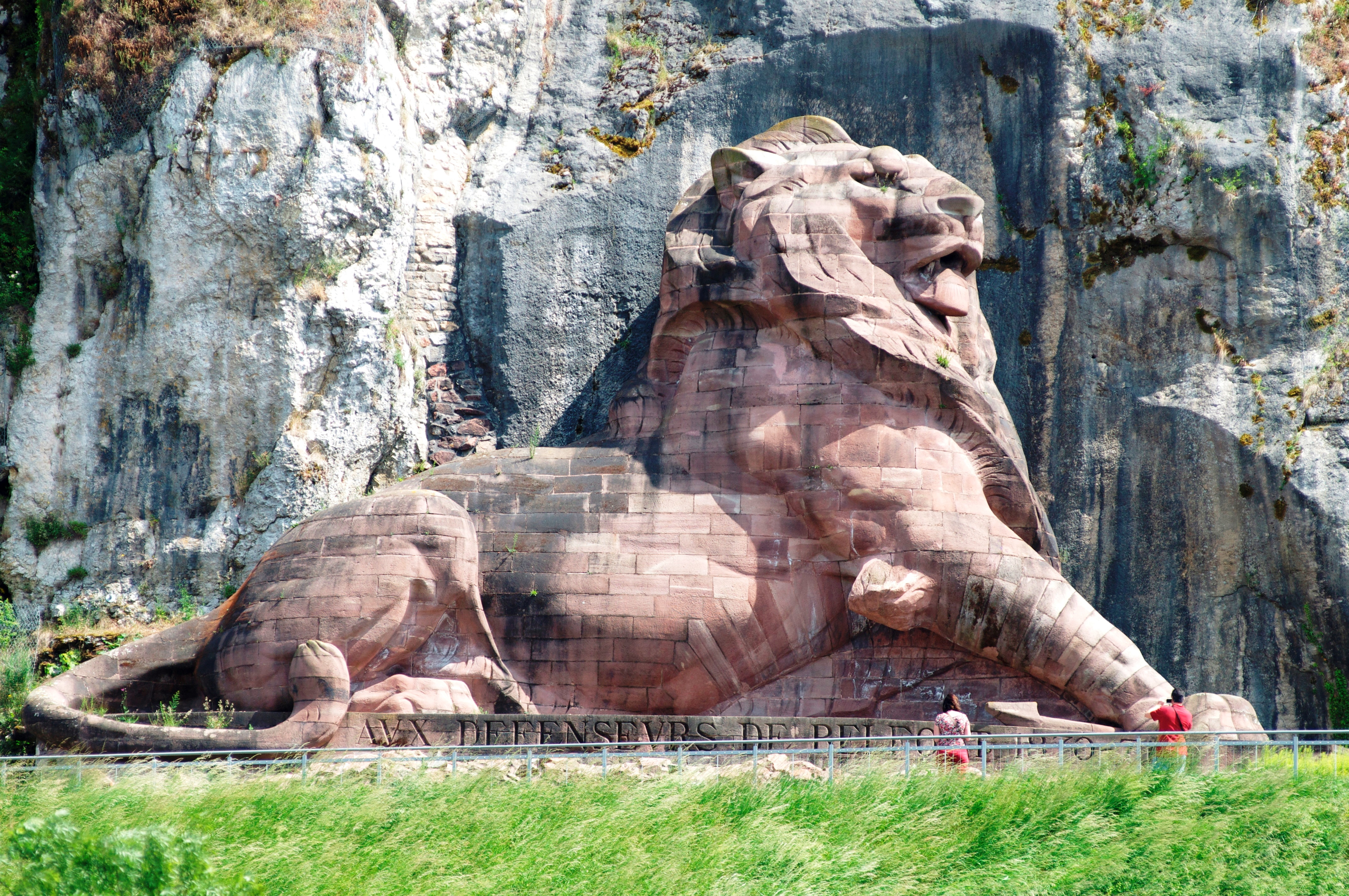 Le Lion de Belfort, sculpture de 22 m de long et 11 m de haut .